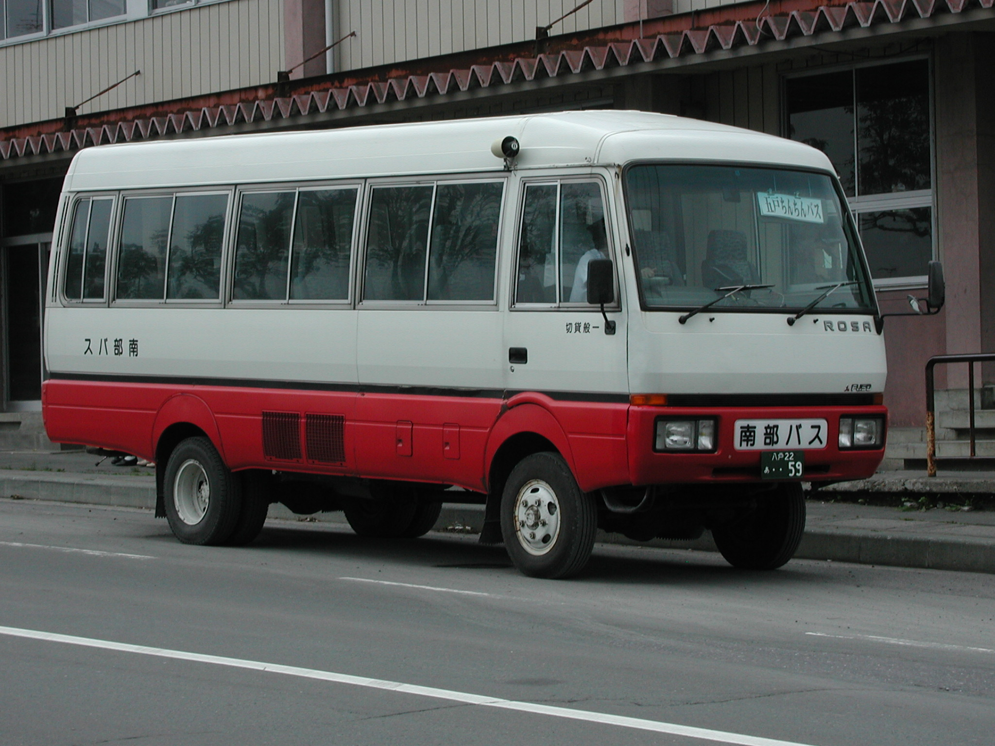 南部バス：マイクロ車両（三菱ふそう・ローザ） - 五戸ちんちんバス運用五戸営業所旧庁舎前にて（※：道路側より撮影）